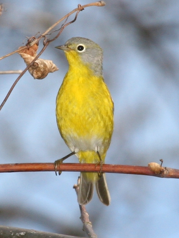 Nashville Warbler (Vermivora ruficapilla)